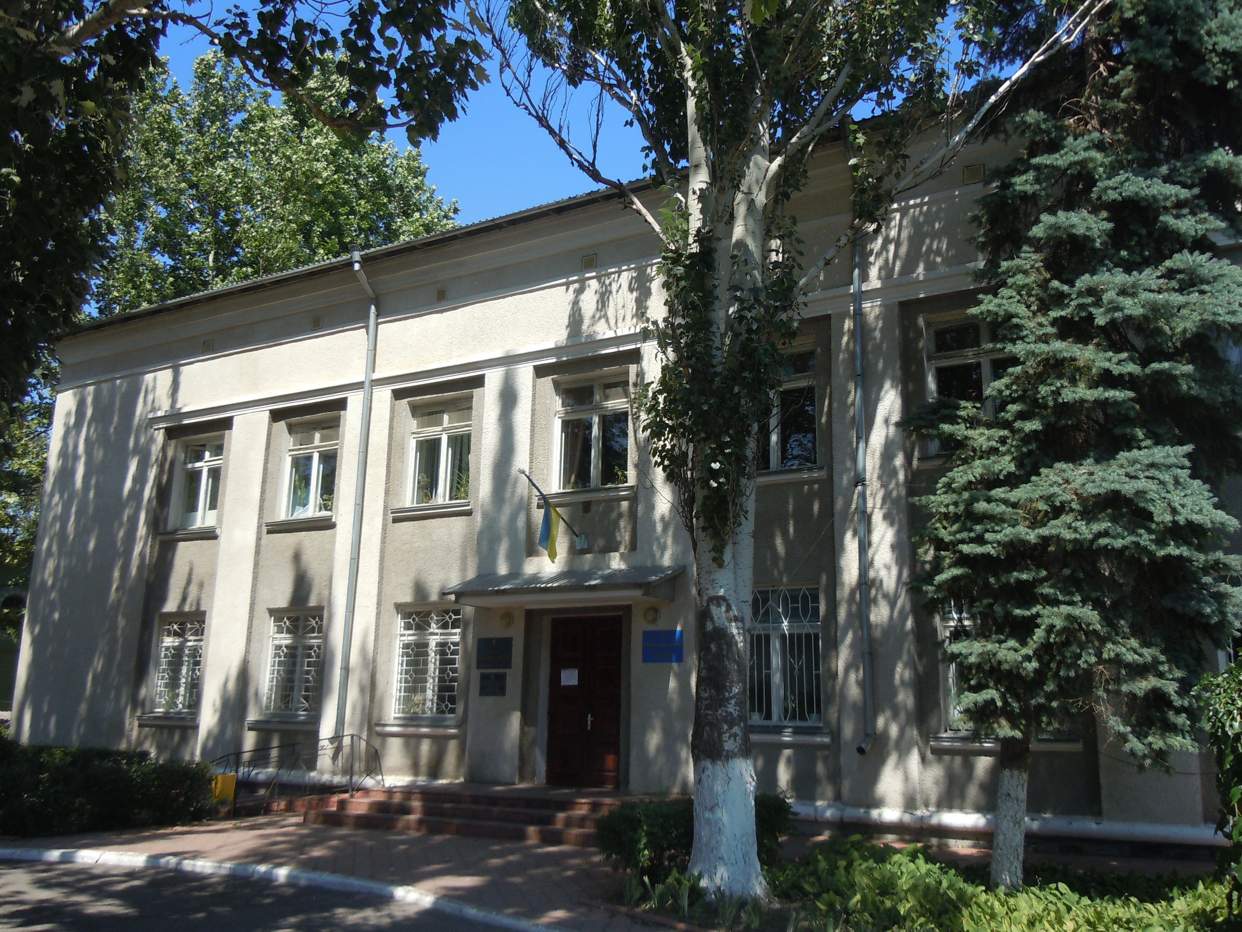 Біляївська районна рада, м. Біляївка